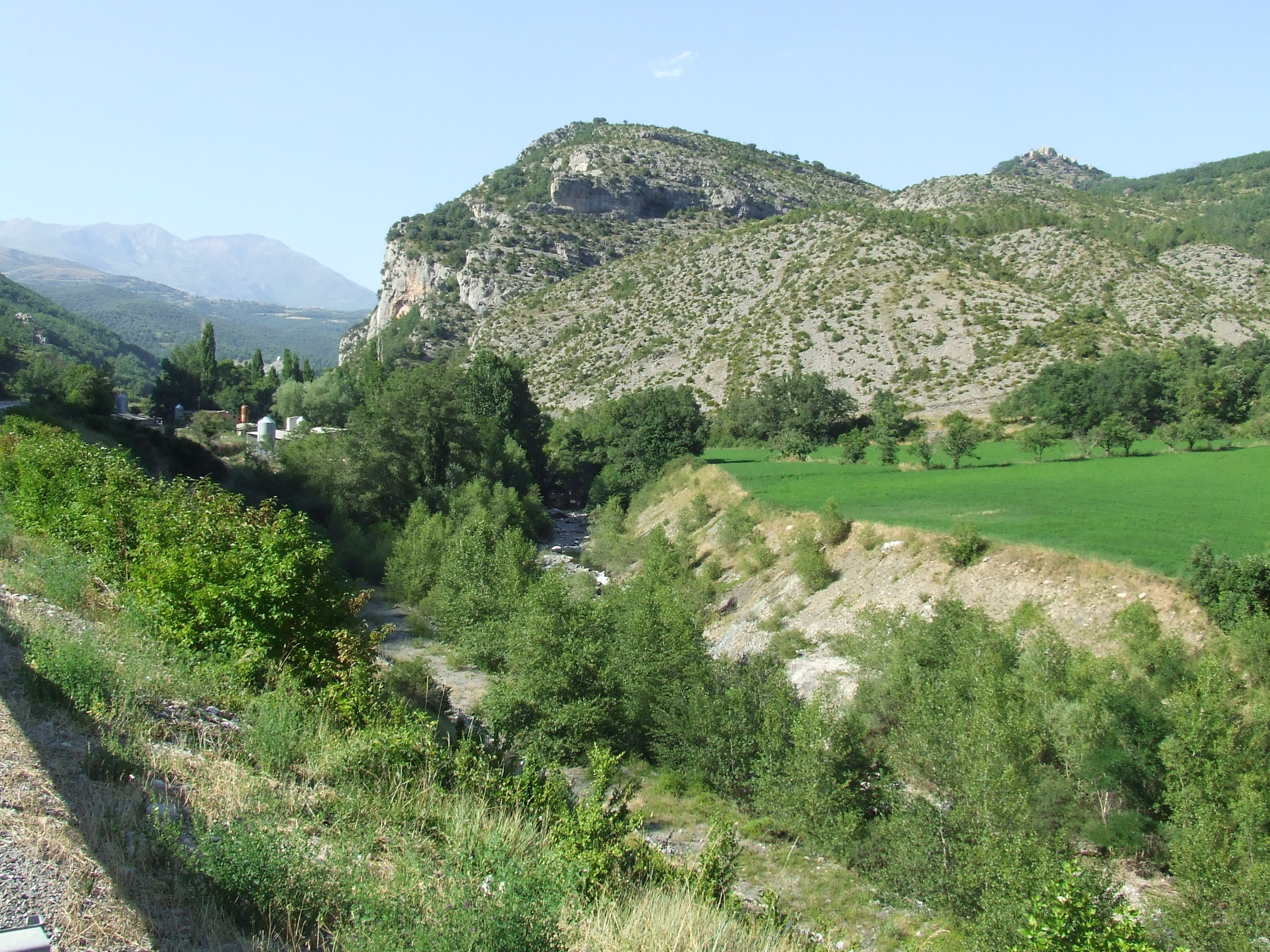 La vall del Flamisell, prop de Lluçà (Senterada, Pallars Jussà)